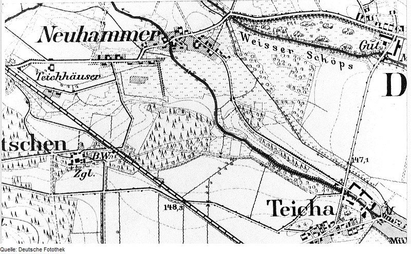 Original image description from the Deutsche Fotothek Rietschen-Neuhammer. Meßtischblatt, Sekt. Mücka, 1887